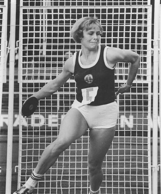 Karin Illgen ADN-ZB Wendorf-06.08.1971 Berlin:Vorbereitung X. Leichtathletik-Europameisterschaften vom 10.-15.August 1971 in Helsinki-Zu den vom DVfL der DDR nominierten 70 Leichtathleten gehört die Diskuswerferin Karin Illgen (SC DHfK Leipzig) . Bei den Prüfungswettkämpfen am 31.Juli 1971 im Berliner Jahn-Sportpark erreichte sie 60,90 m. (Foto von einem früheren Wettkampf) .